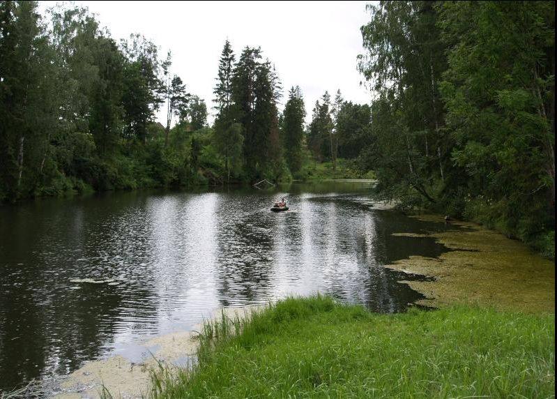 Tikste paisjarv